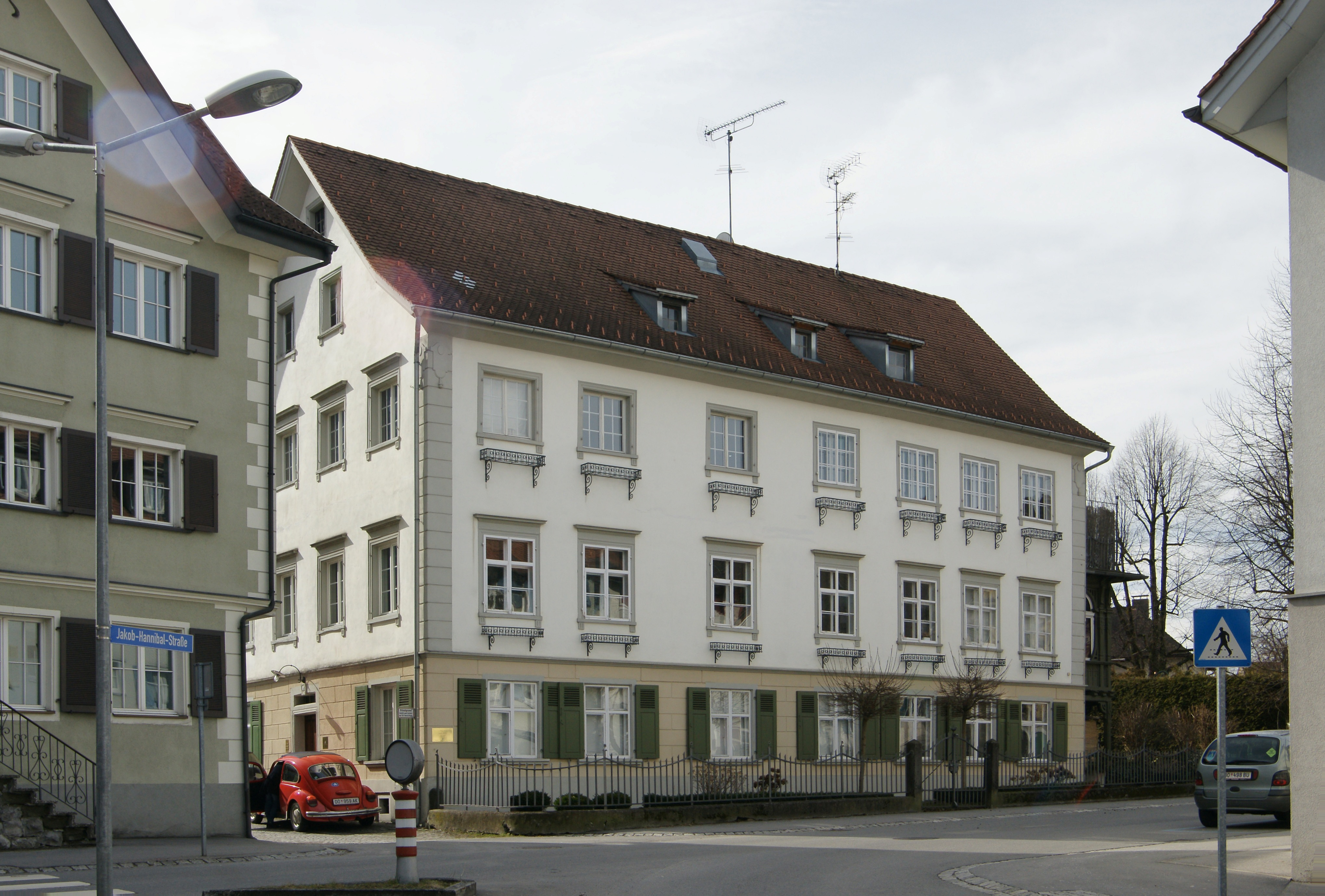 1797 gründete der aus Augsburg stammende Herz Jakob Kitzinger das erste Kaffeehaus Vorarlbergs. Das "Kaffeehaus Kitzinger" war bald Treffpunkt für die verschiedensten israelitischen Geselligkeitsvereine. Das Kitzinger Haus steht in der Schweizer Straße Nr.:15, Ecke Jakob-Hannibal-Straße in Hohenems. Info Dieses Objekt steht unter Denkmalschutz.